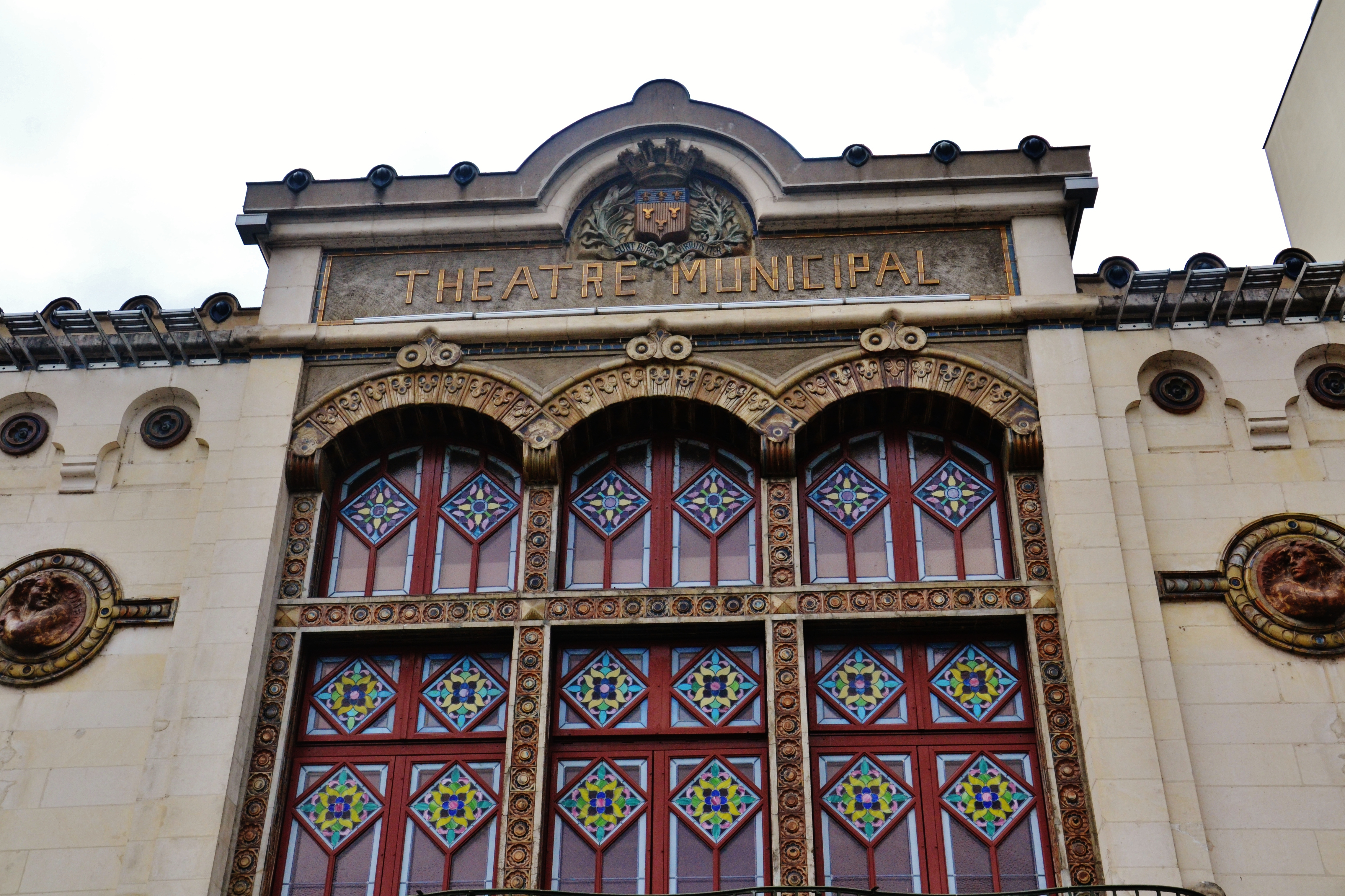 La façade du théâtre des 7 collines de Tulle (Corrèze, France)